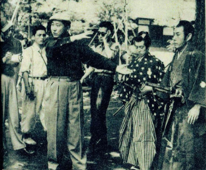 キネマ旬報社『キネマ旬報』第178号(1957)より『風雲天満動乱』撮影シーン。左から3番目は監督の山田達雄。